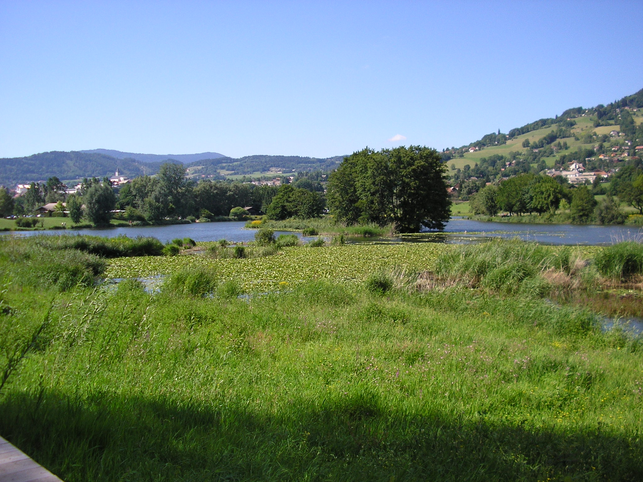 Le lac du Môle en Haute-Savoie (74).